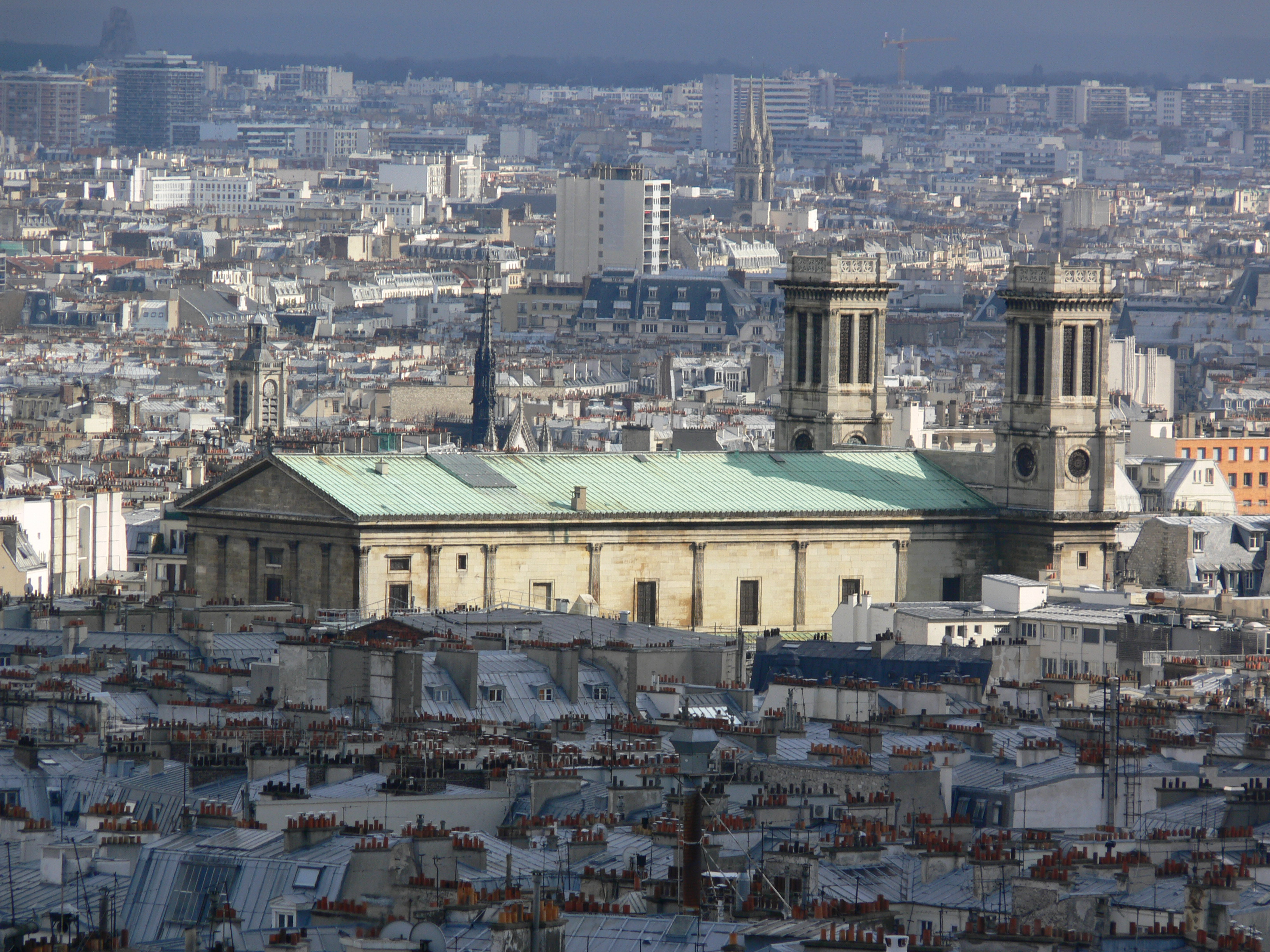 Église Saint-Vincent-de-Paul, Paris, France (vue de la Basilique du Sacre-Coeur, Montmartre)